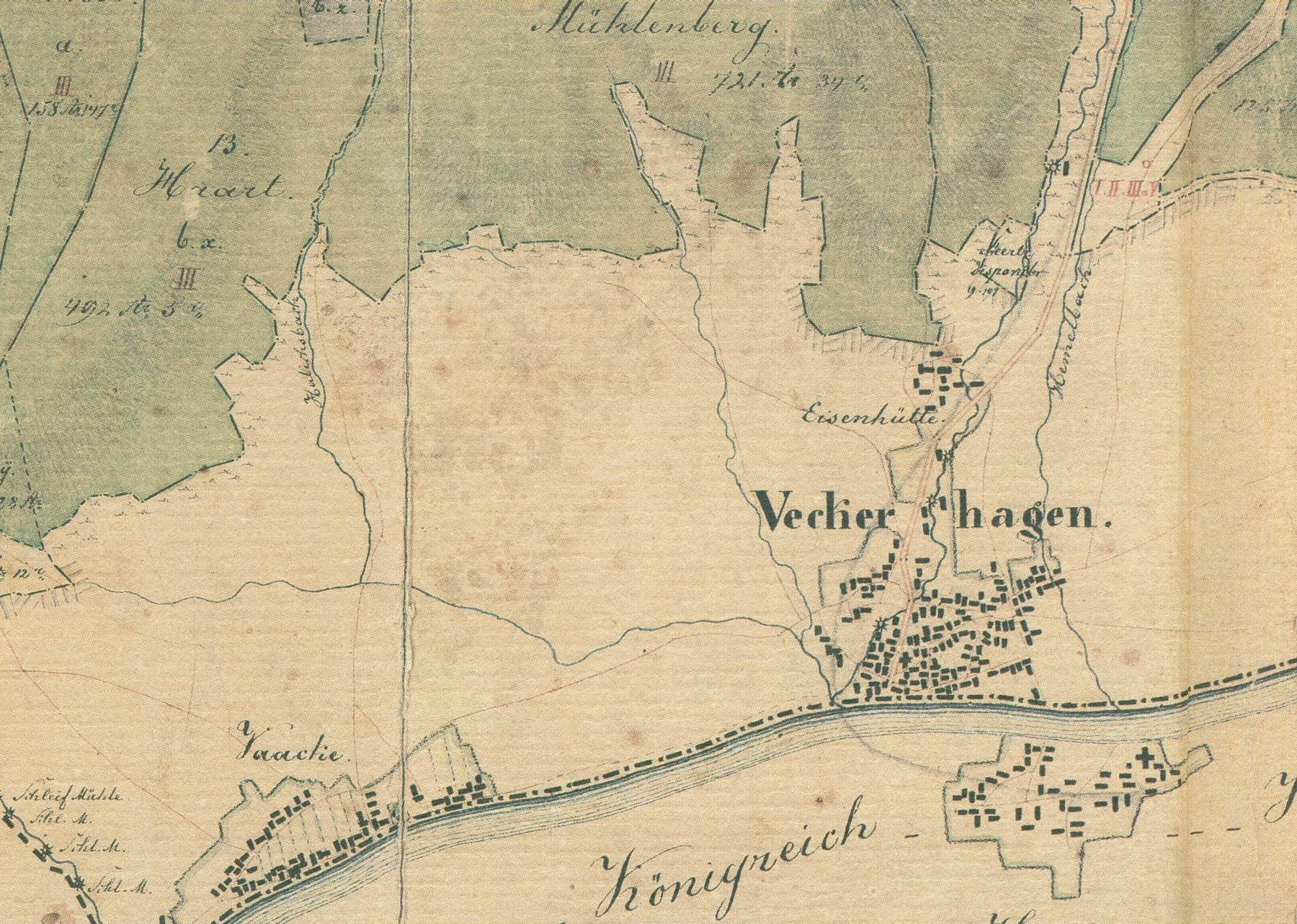 Karte von Reinhardshagen von 1841 Quelle: Staatsarchiv Marburg Fotograf/Zeichner: Forstgeometer Fehr, Forstinspection Reinhardswald Datum: 1841